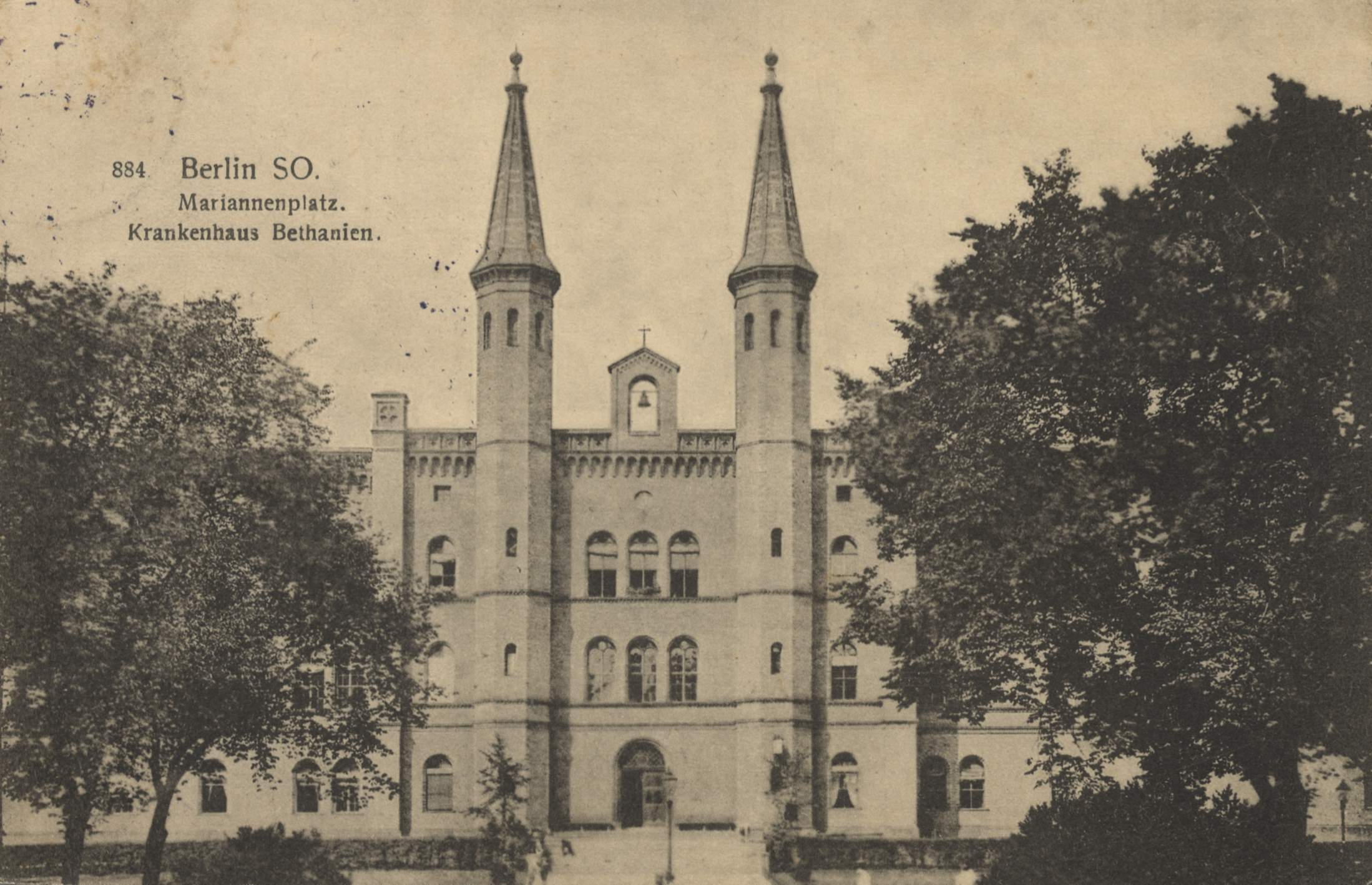 Krankenhaus Bethanien am Mariannenplatz in Berlin-Kreuzberg